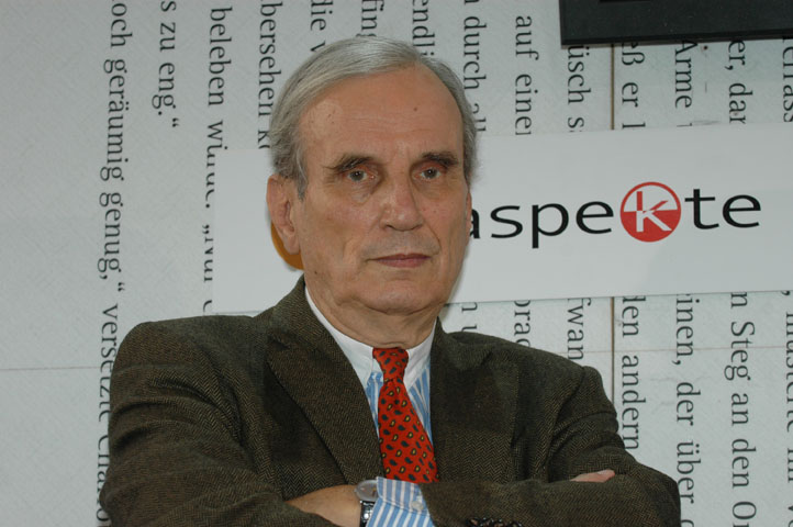 Joachim Fest. Dieses Fotos dürfen Sie honorarfrei nutzen, wenn Sie folgenden credit beachten: Copyright: Das blaue Sofa / Club Bertelsmann.